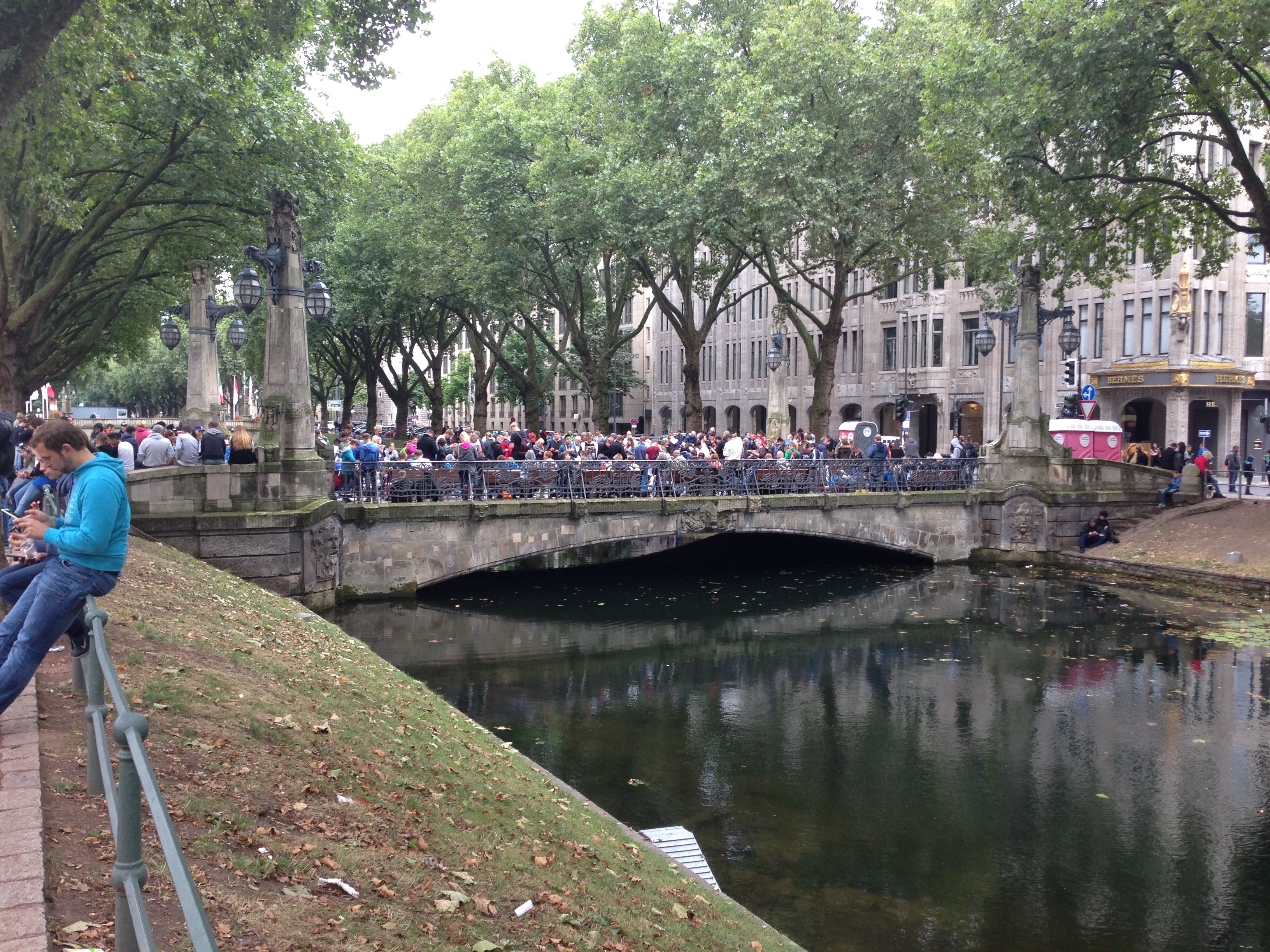 Gesperrte Girardet-Brücke an der Königsallee in Düsseldorf